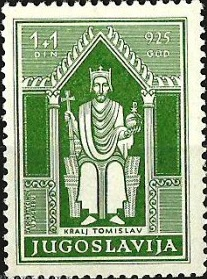 Почтовая марка Югославии, 1940 г. Томислав Хорватский